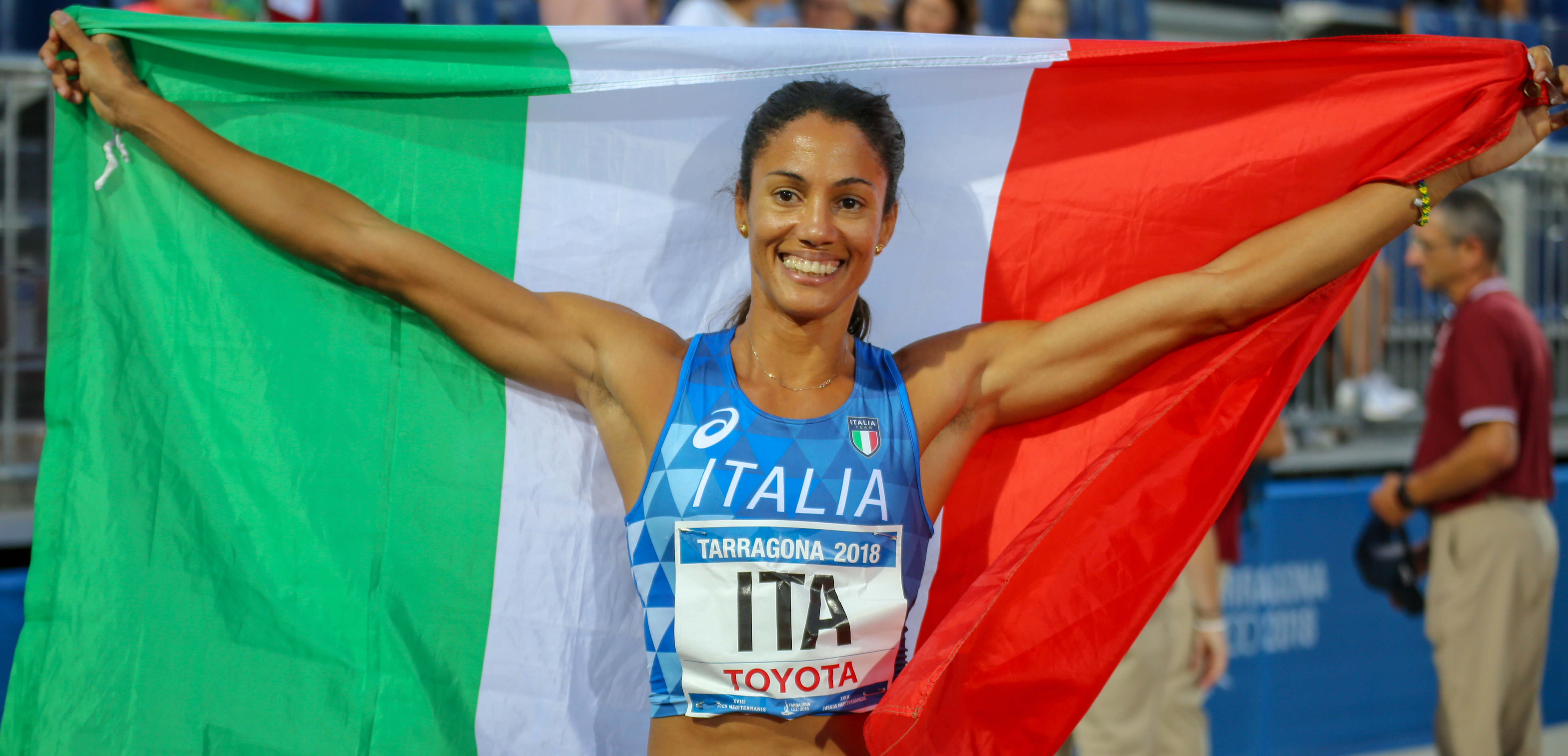 Libania Grenot en los Juegos del Mediterráneo 2018